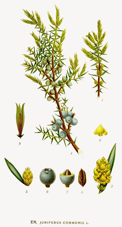 Original Description En, Juniperus communis L.